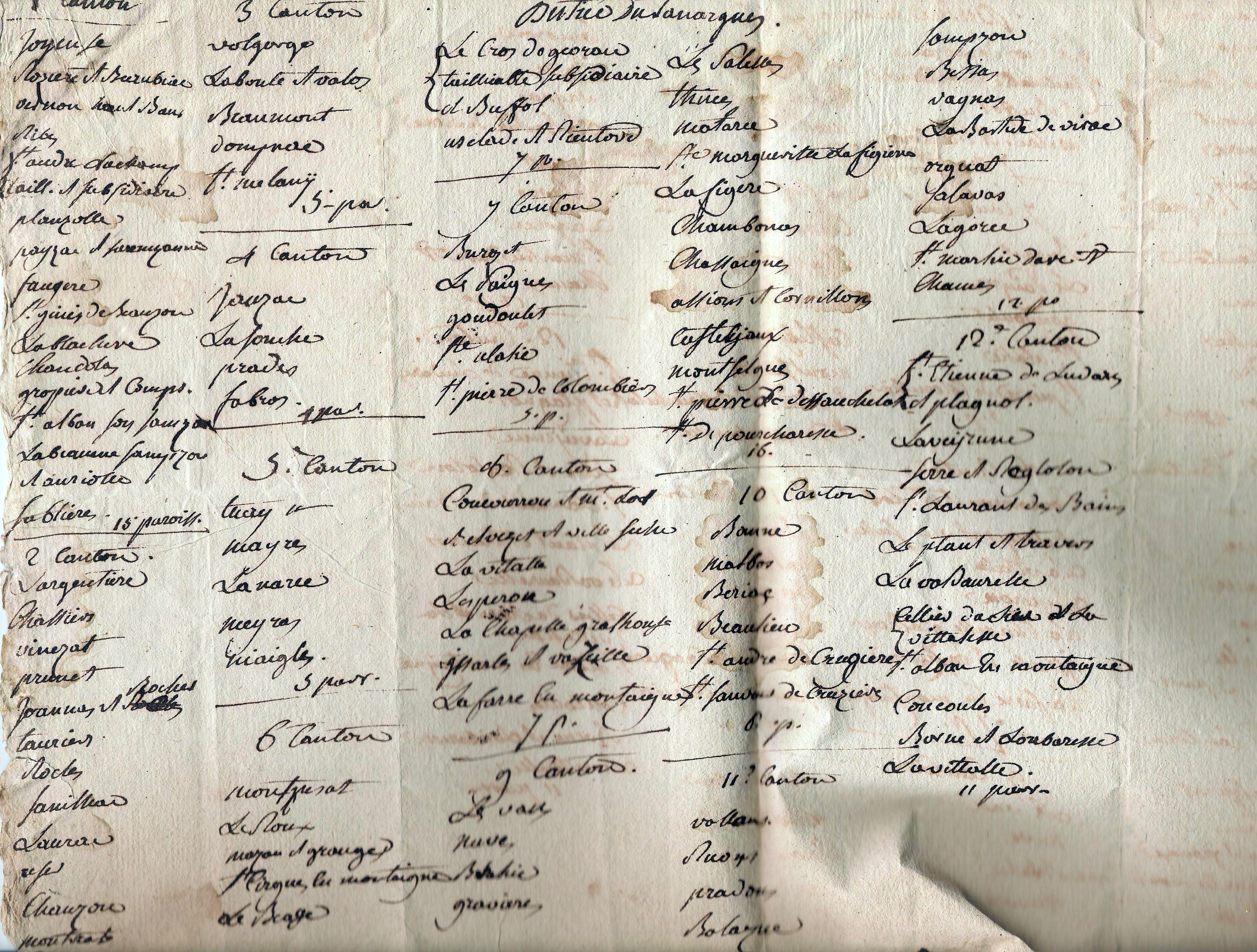 document d'époque :composition du district du Tanarue vers 1790.